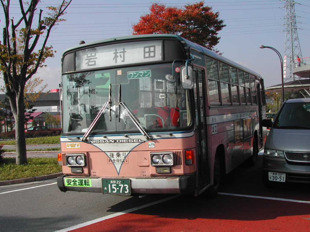 佐久平駅にて 2002-10-14